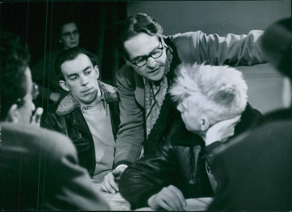 Från inspelningen av filmen Medan staden sover (1950). Från vänster: Sven-Eric Gamble, regissör Lars-Eric Kjellgren och Arne Ragneborn. Att döma av informationen på fotografiets baksida har fotot införts i Filmjournalen 1950:12.